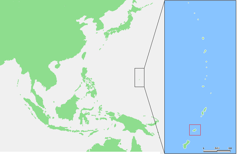 Mariana Islands - Rota.PNG